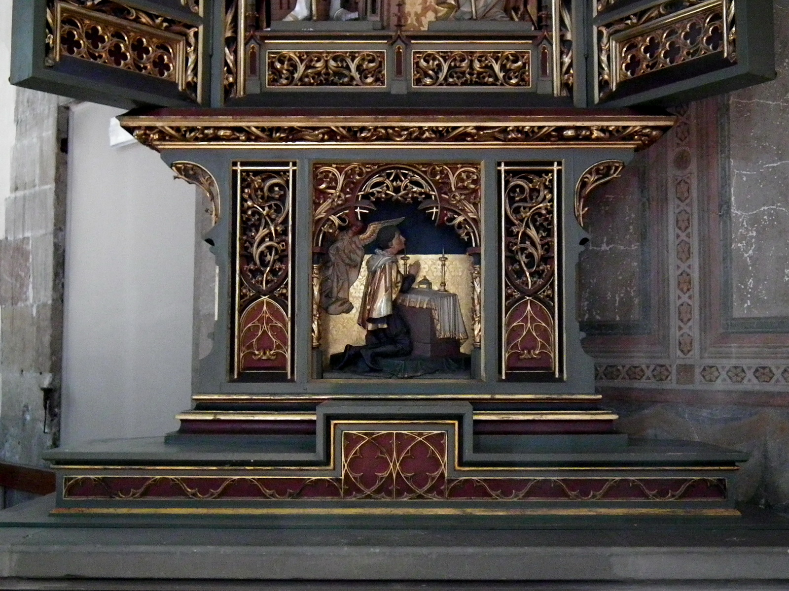 A predella of a side altar Bolzano Cathedral Native nameDom Maria Himmelfahrt/Duomo di BolzanoLocationBolzano, ItalyCoordinates46° 29′ 51.14″ N, 11° 21′ 14.17″ E